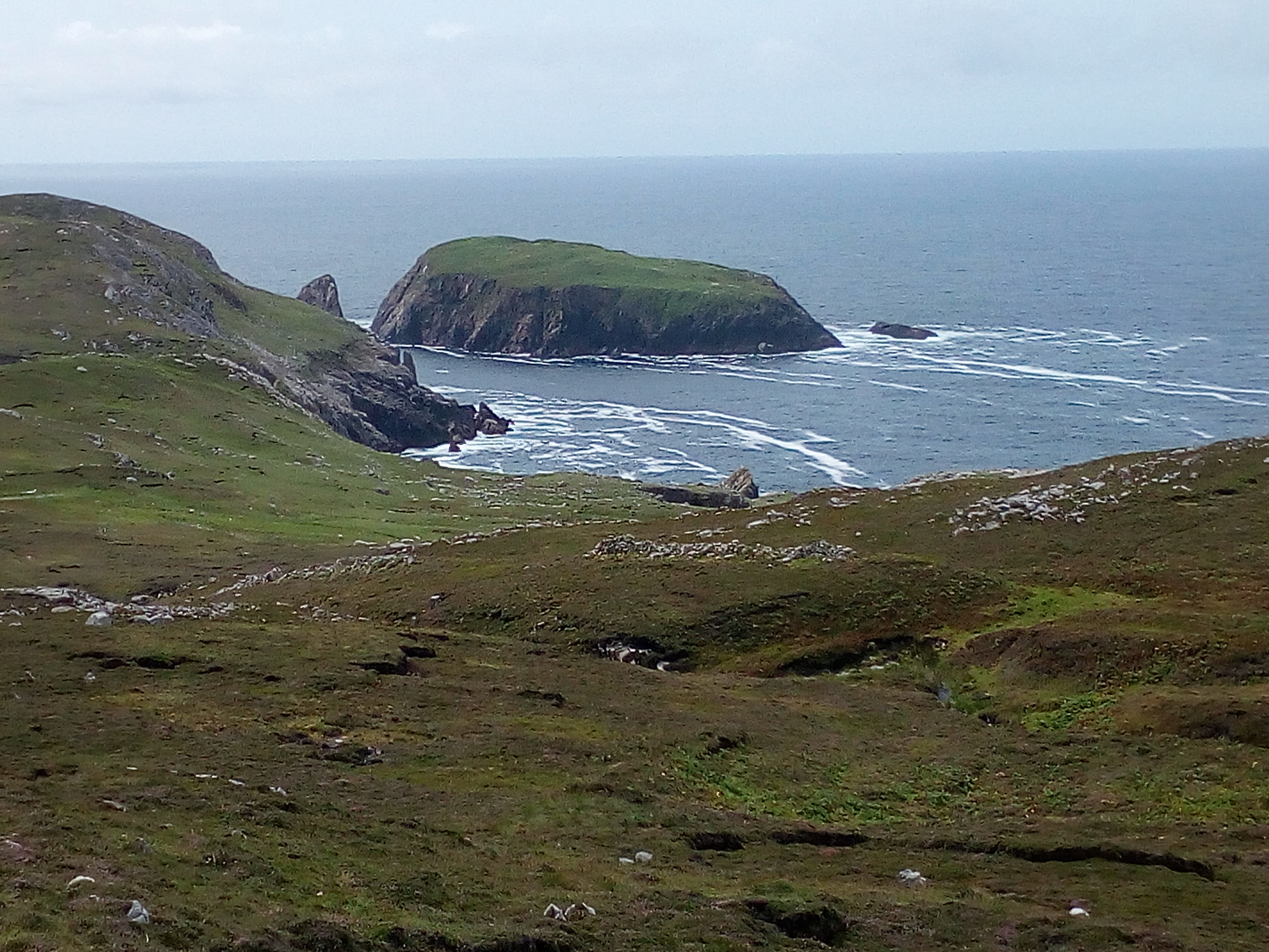 Des d'Arranmore